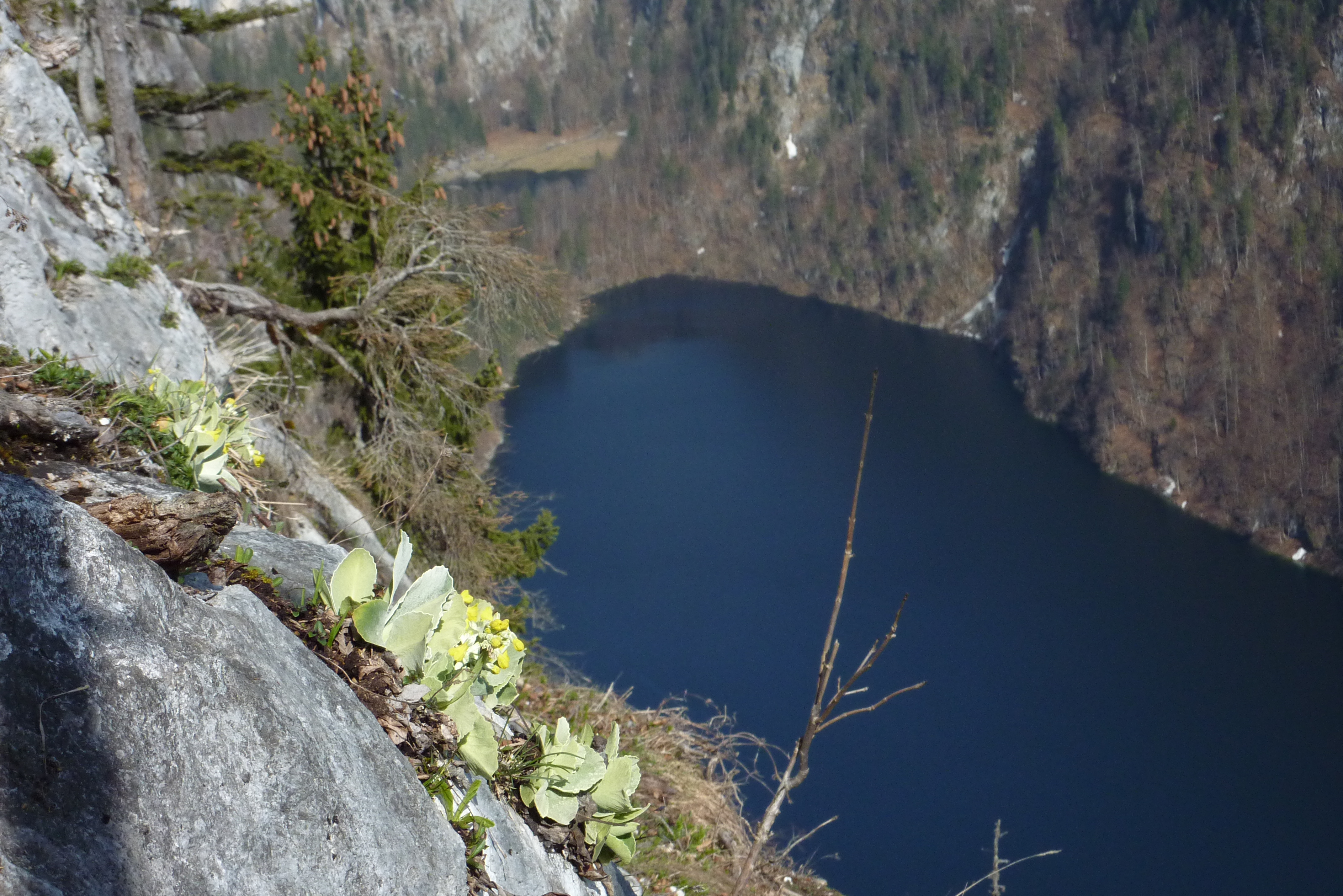 Totes Gebirge West This media shows the nature reserve in Styria with the ID NSG 16 a.